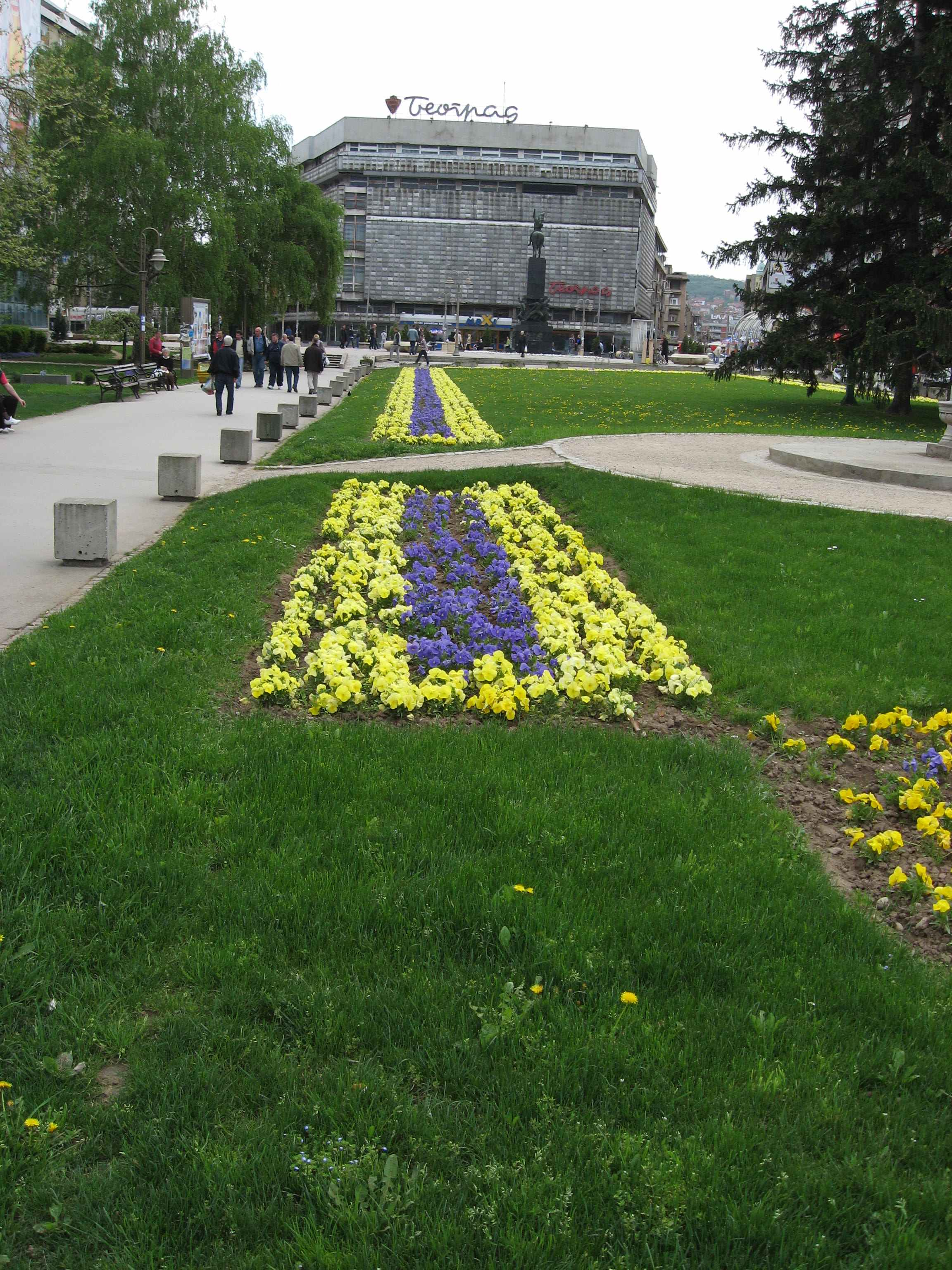 Dragan Cvetkovic Nis Nis centar grada prolece, sopstvena slika